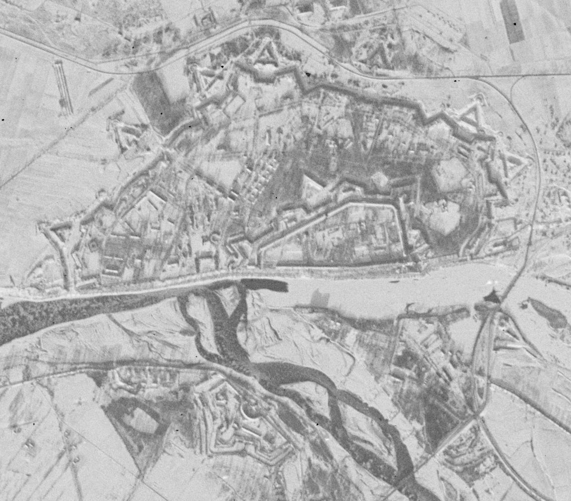 Zdjęcie satelitarne Twierdzy Modlin wykonane między 12 a 16 grudnia 1961 przez amerykańskiego satelitę wywiadowczego Discoverer 36. Zdjęcie stanowi część b klatki nr 40. Zdjęcie odbite lustrzanie w obu kierunkach i obrócone tak, aby odzwierciedlało rzeczywiste położenie sfotografowanych obiektów. Zdjęcie w pełnej rozdzielczości.